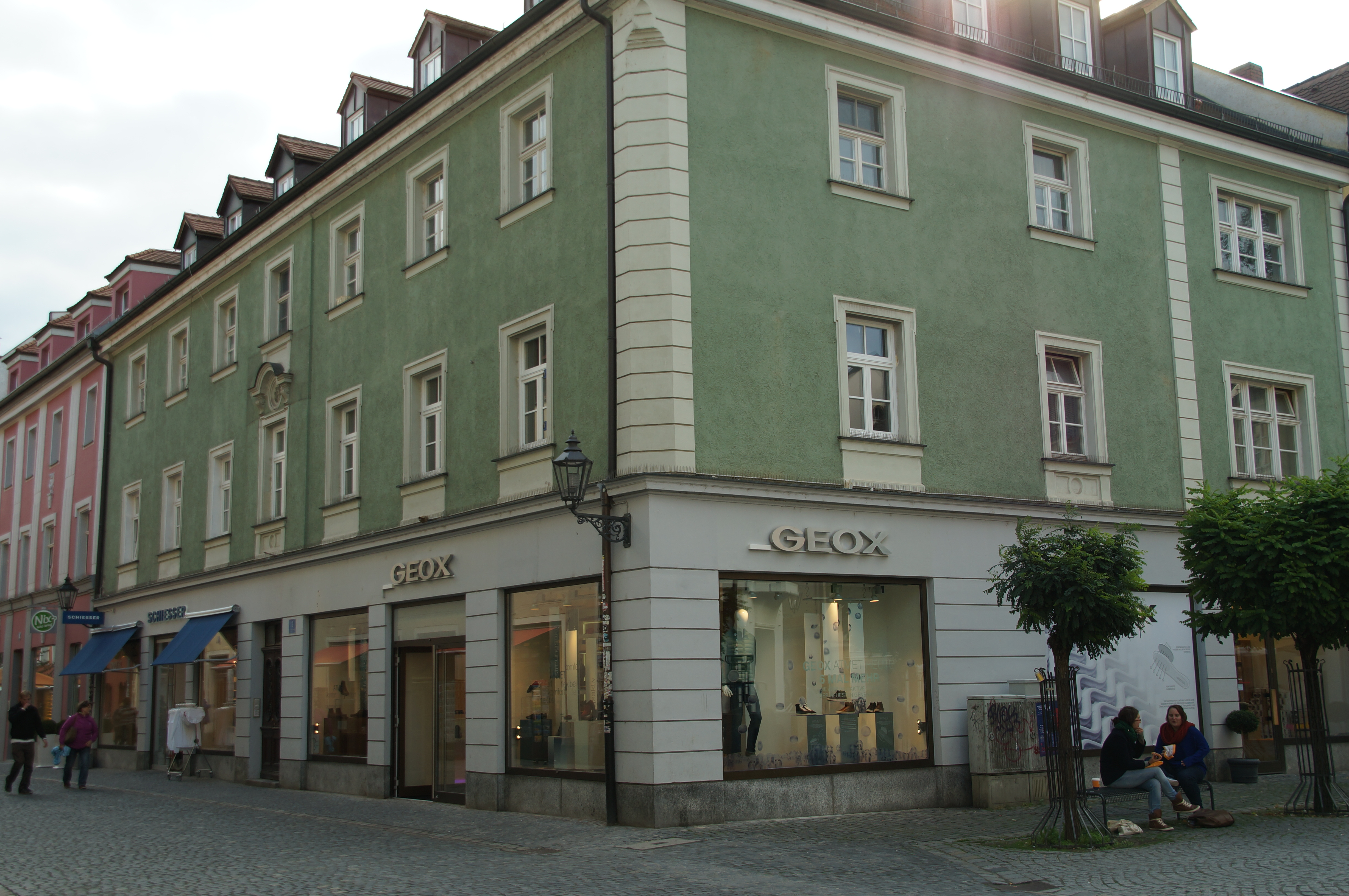 Wohnhaus, dreigeschossiger und traufständiger Walmdachbau in Ecklage, 1874, auf älterem Kern.This is a photograph of an architectural monument.